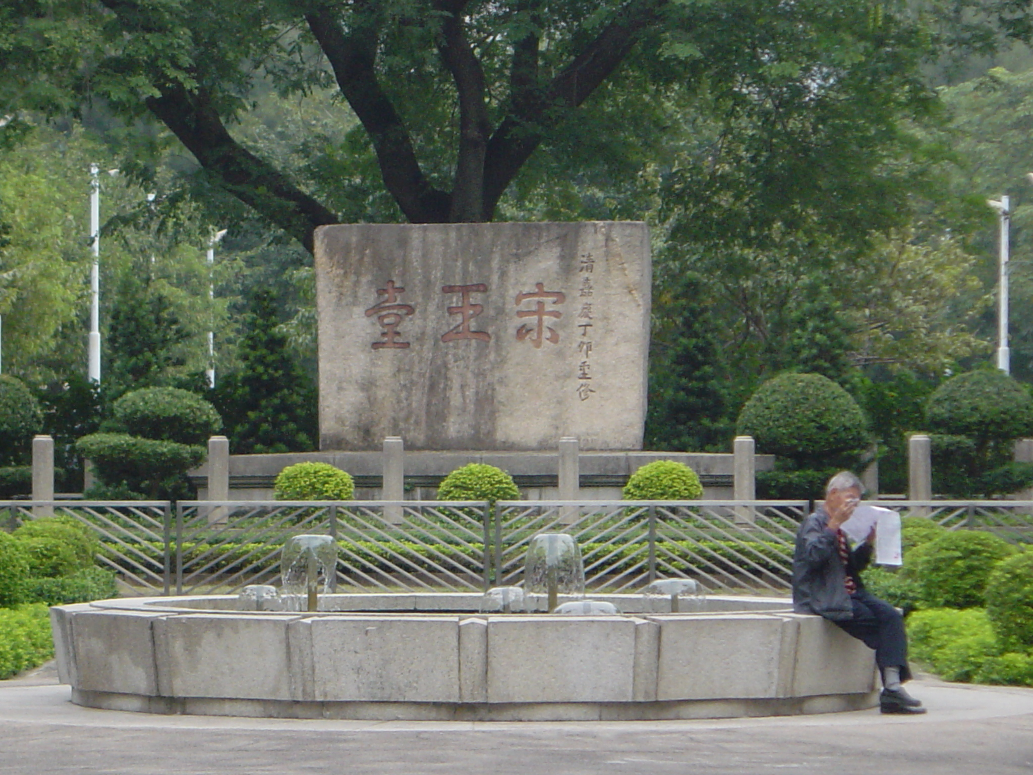 香港宋王臺花園一景象。Sung Wong Toi, Hong Kong.